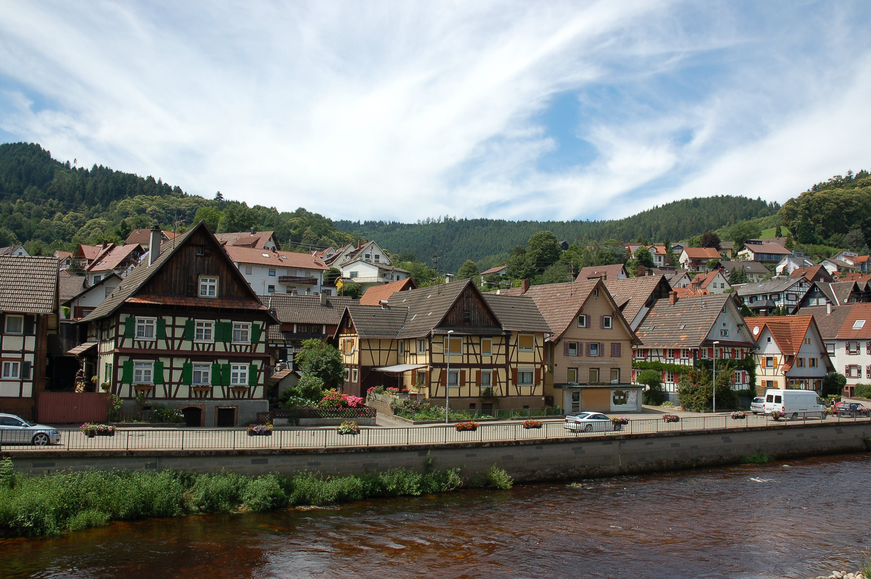 Obertsrot, Stadtteil von Gernsbach, Schwarzwald